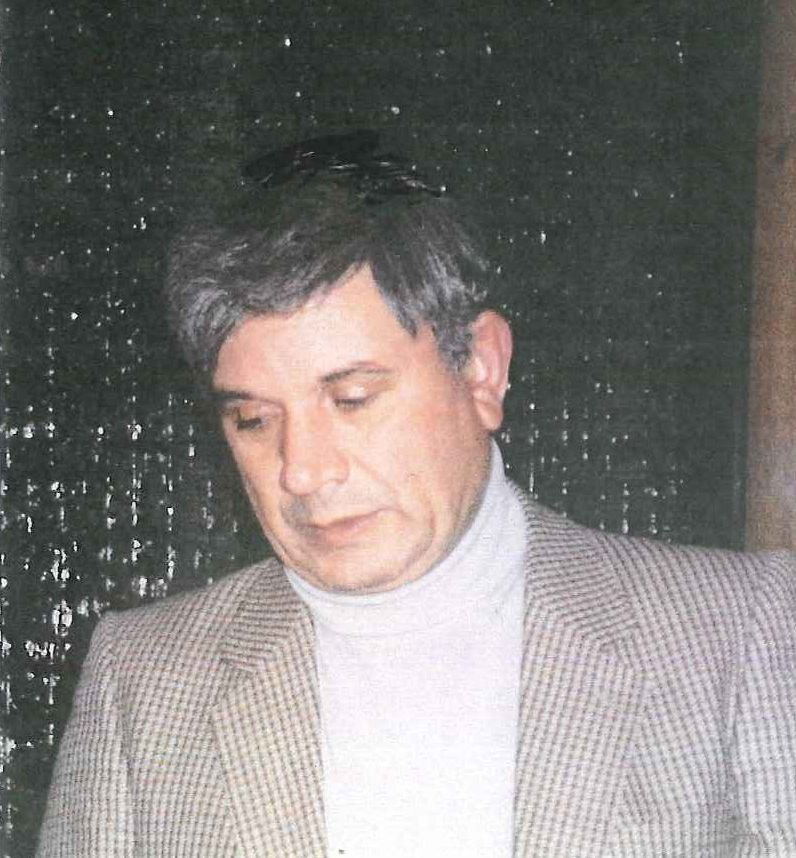 נהוראי שטרית